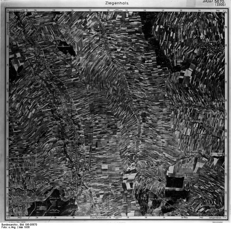 Ziegenhals